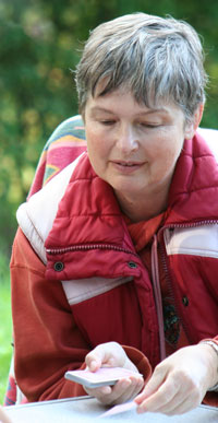 Krystyna Gutowska - Polish philosopher. Photo by: Łukasz Kobyliński